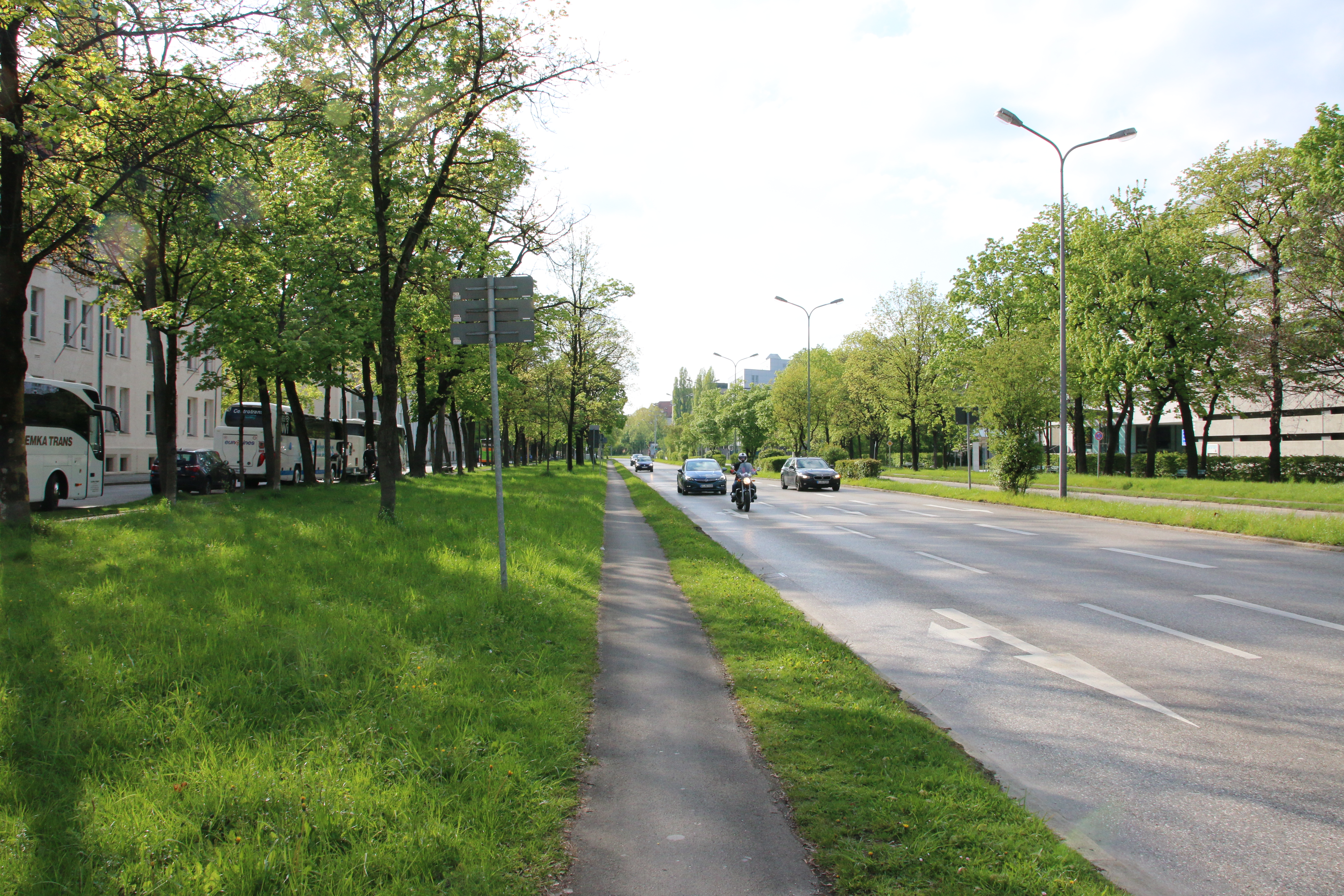 Der Marsplatz mit Marsstraße, dem Wittelsbacher Gymanasium (links) und dem Telekom-Gebäude rechts bildet das Zentrum des Stadtbezirks Marsfeld